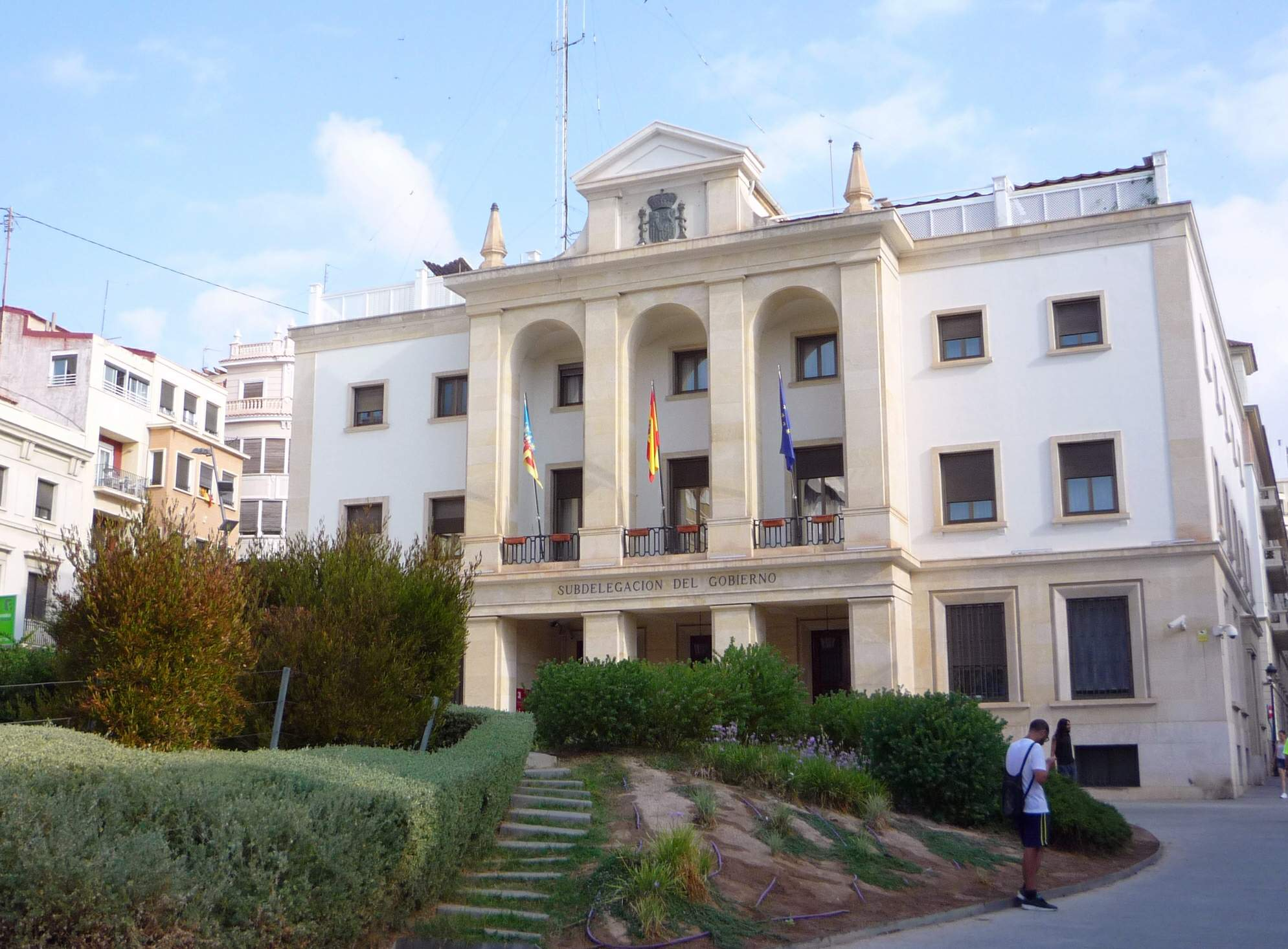 Subdelegación del Gobierno en Alicante